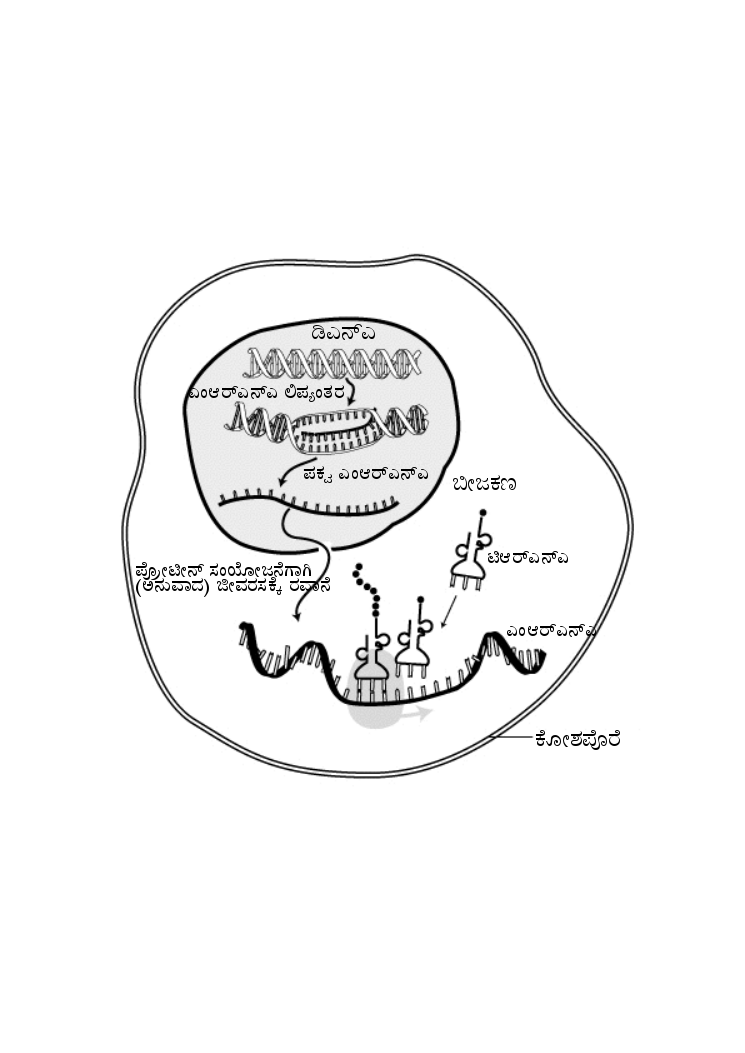 ಕನ್ನಡ: ಆರ್‌ಎನ್ಎ ಬೀಜಕಣದಲ್ಲಿ ಲಿಪ್ಯಂತರವಾಗುತ್ತದೆ ಮತ್ತು ಒಮ್ಮೆ ಪೂರ್ಣವಾಗಿ ಸಂಸ್ಕರಿಸಿದ ಮೇಲೆ ಆರ್‌ಎನ್ಎಯನ್ನು ಜೀವರಸಕ್ಕೆ ರವಾನಿಸಲಾಗುತ್ತದೆ. ಇದನ್ನು ಮುಂದೆ ರೈಬೋಸೋಮ್‌ (ನಸು ಬೂದಿ ಬಣ್ಣದಲ್ಲಿ ಟಿಆರ್‌ಎನ್ಎ ಹಿಂದೆ ತೋರಿಸಲಾಗಿದೆ) ಅನುವಾದಿಸುತ್ತದೆ.